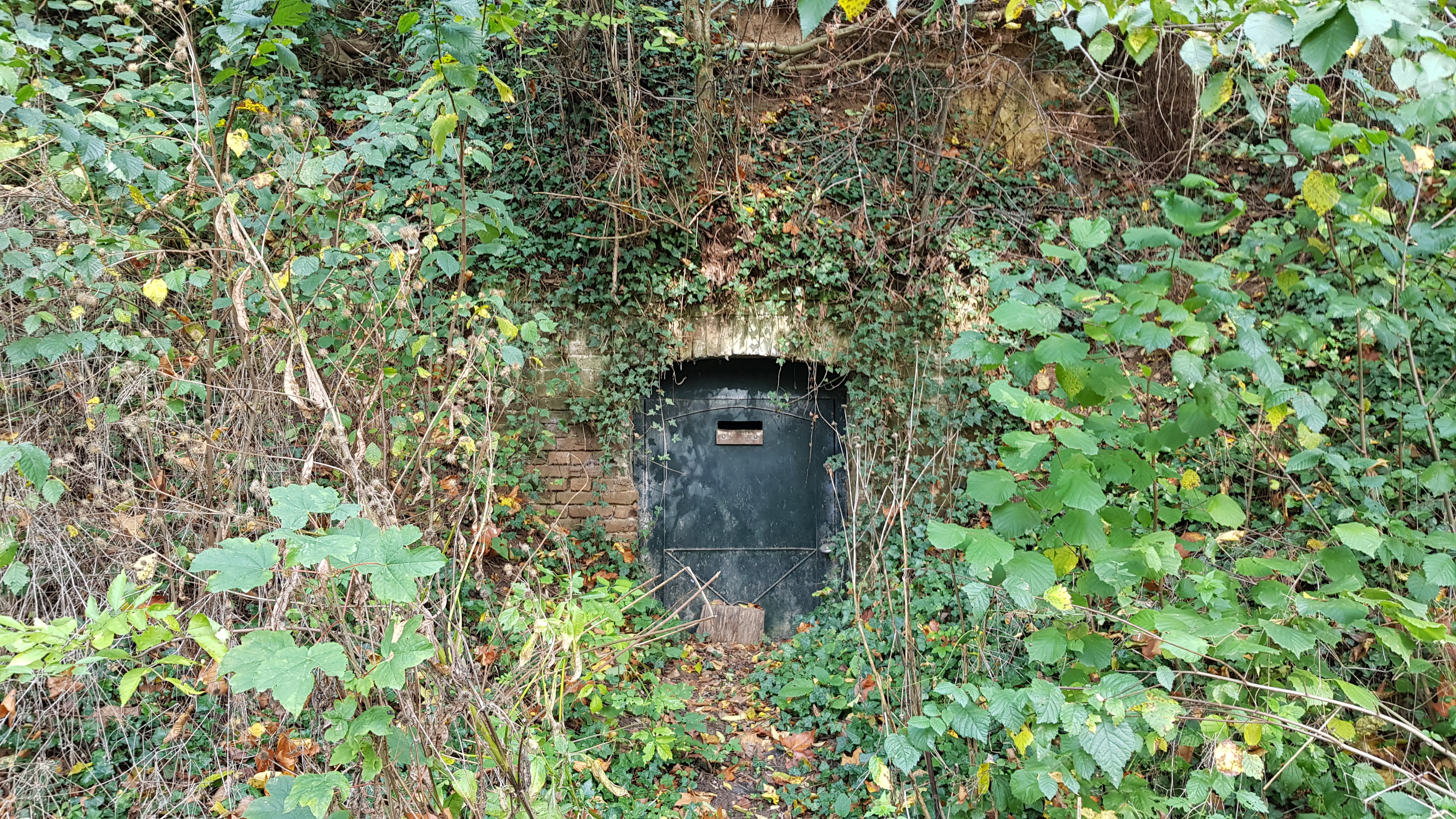 Oosterweggroeve I, Valkenburg aan de Geul, Nederland